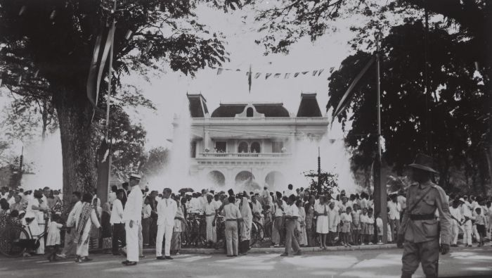 foto. Bevolking voor het gouverneurshuis te Medan met spuitende fonteinen in de tuin, ter gelegenheid van het huwelijk van Prinses Juliana met Prins Bernhard